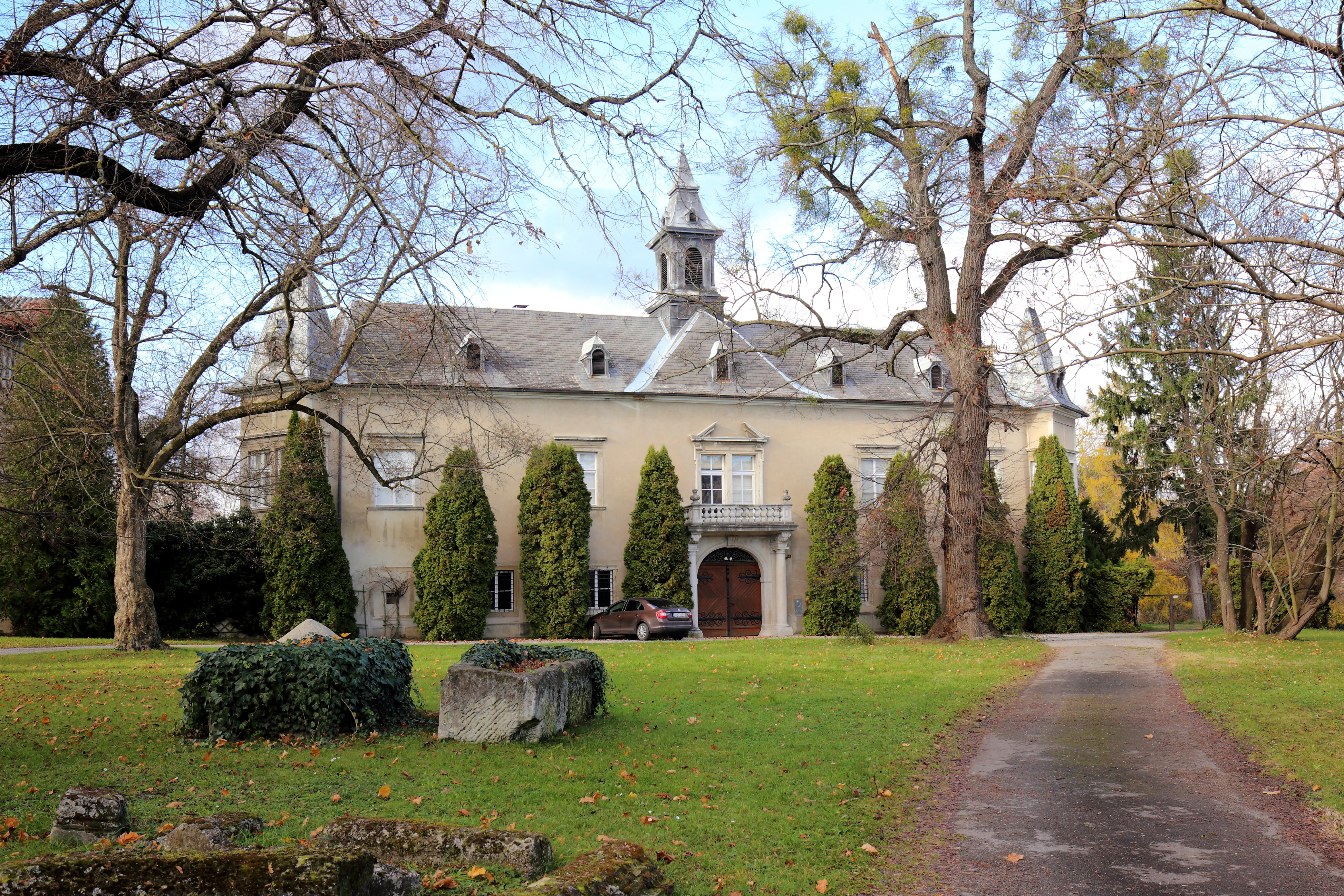 Südostansicht des Schlosses Deutsch-Altenburg, auch Schloss Ludwigstorff bezeichnet, in der niederösterreichischen Marktgemeinde Bad Deutsch-Altenburg.Der zweigeschossige Vierflügelbau mit Hof und einem trapezoiden Grundriss ist von einem Park umgeben. Der derzeitige Bau entstand in der 2. Hälfte des 17. Jahrhunderts und wurde im 18. Jahrhundert umgestaltet bzw. ausgebaut. Seit etwa 1708 ist das Schloss im Besitz der Familie Ludwigstorff. Zeitweilig war im Schloss das Afrika-Museum des Forschers Ernst Zwilling untergebracht.